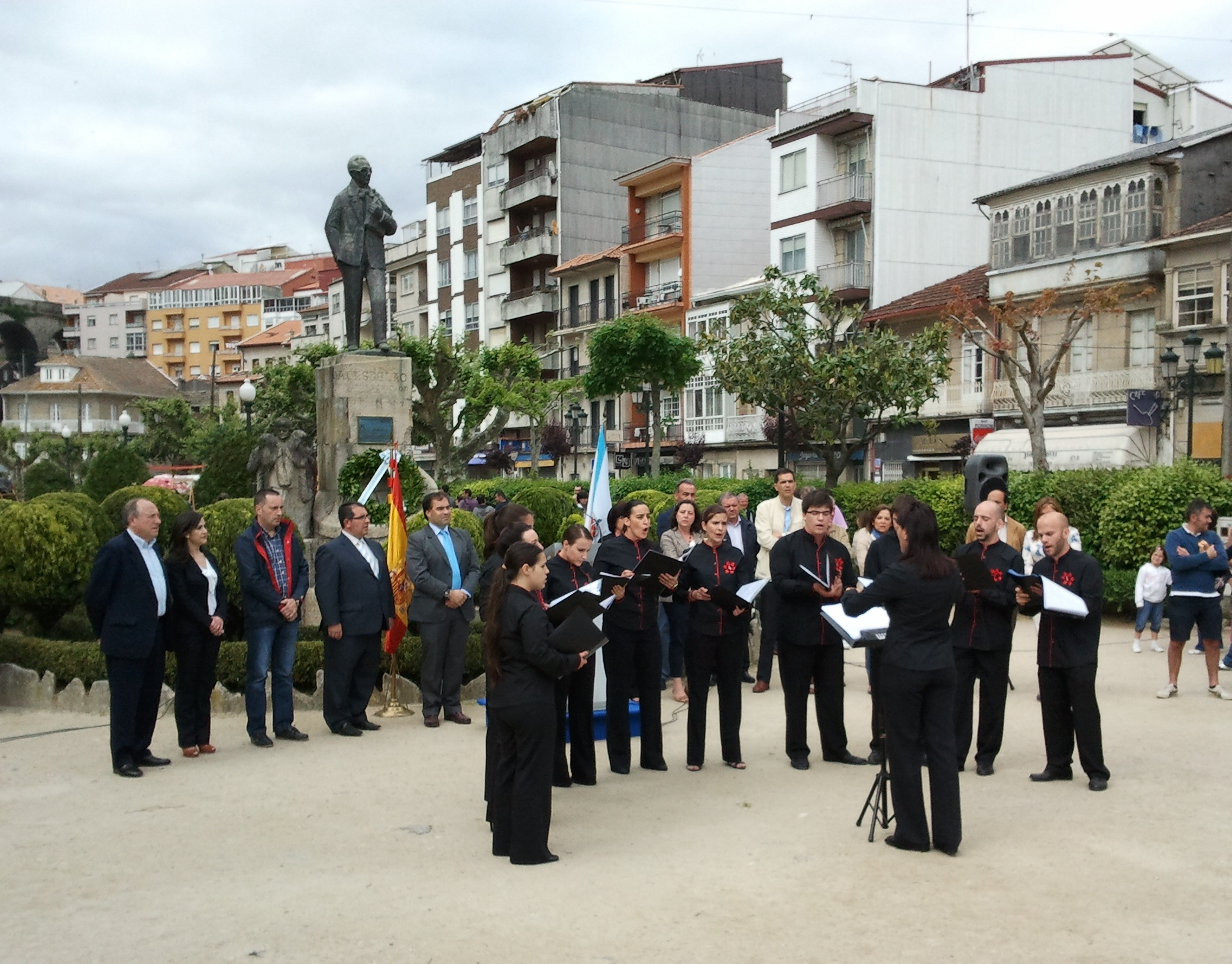 Vexa o título e as categorías.